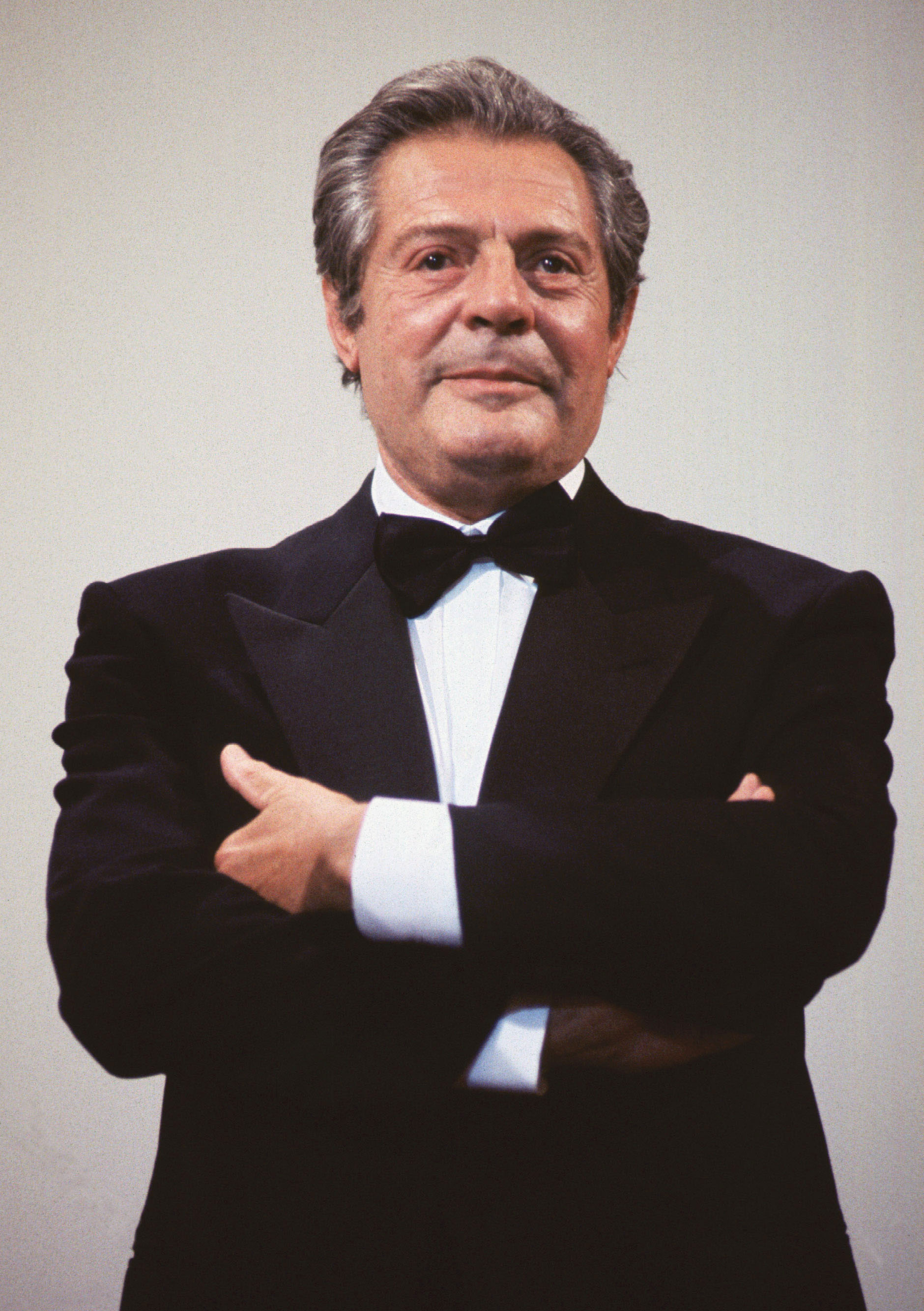 L'attore Marcello Mastroianni alla Mostra del Cinema di Venezia del 1990